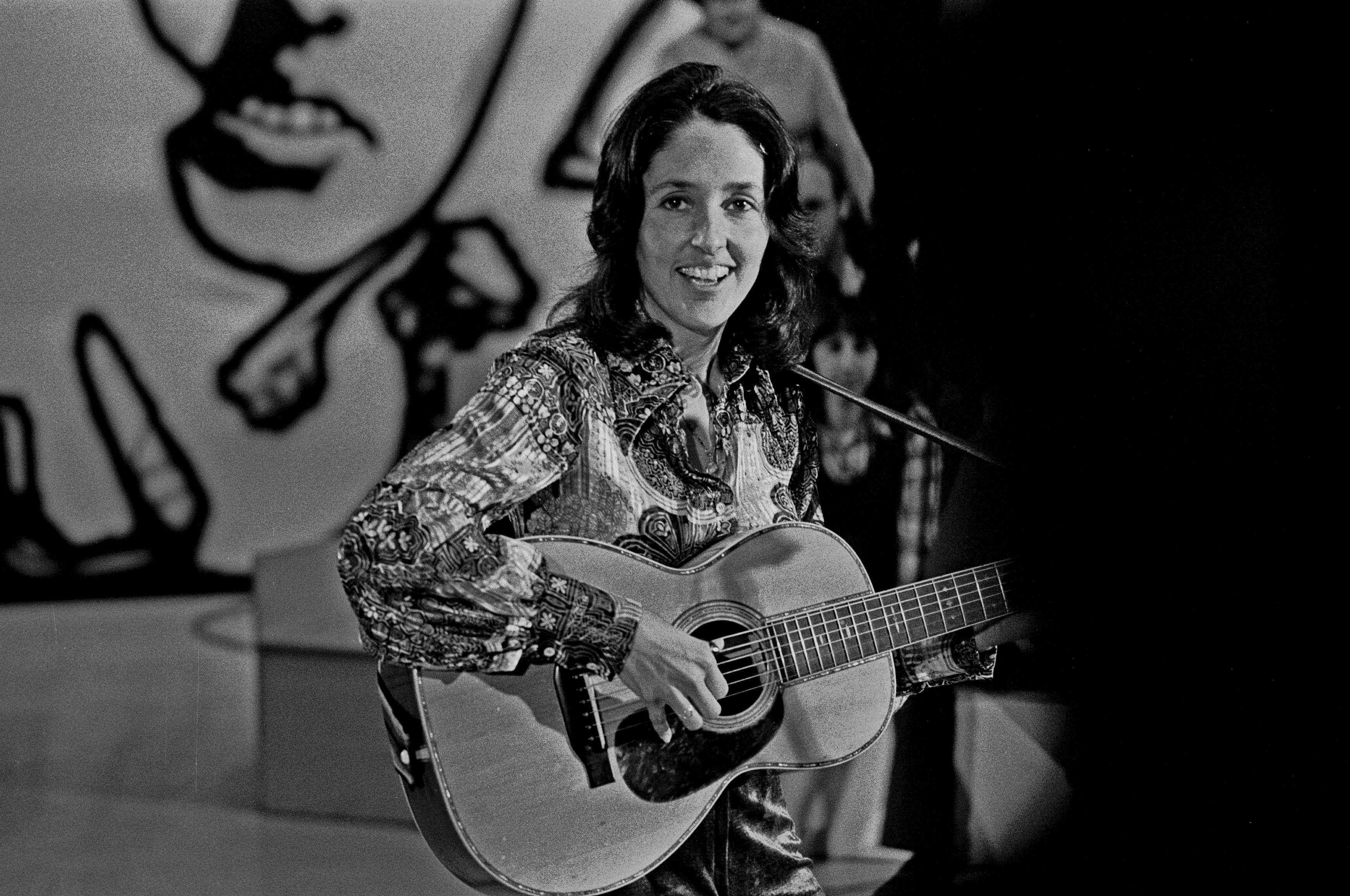 Joan Baez 1903730003_bearbeitet-1 Die Protestwelle ebbte 1973 schon ab, aber Joan Baez hatte nicht nur Protest zu bieten: Hier ein Auftritt im Fernsehstudio in Hamburg.